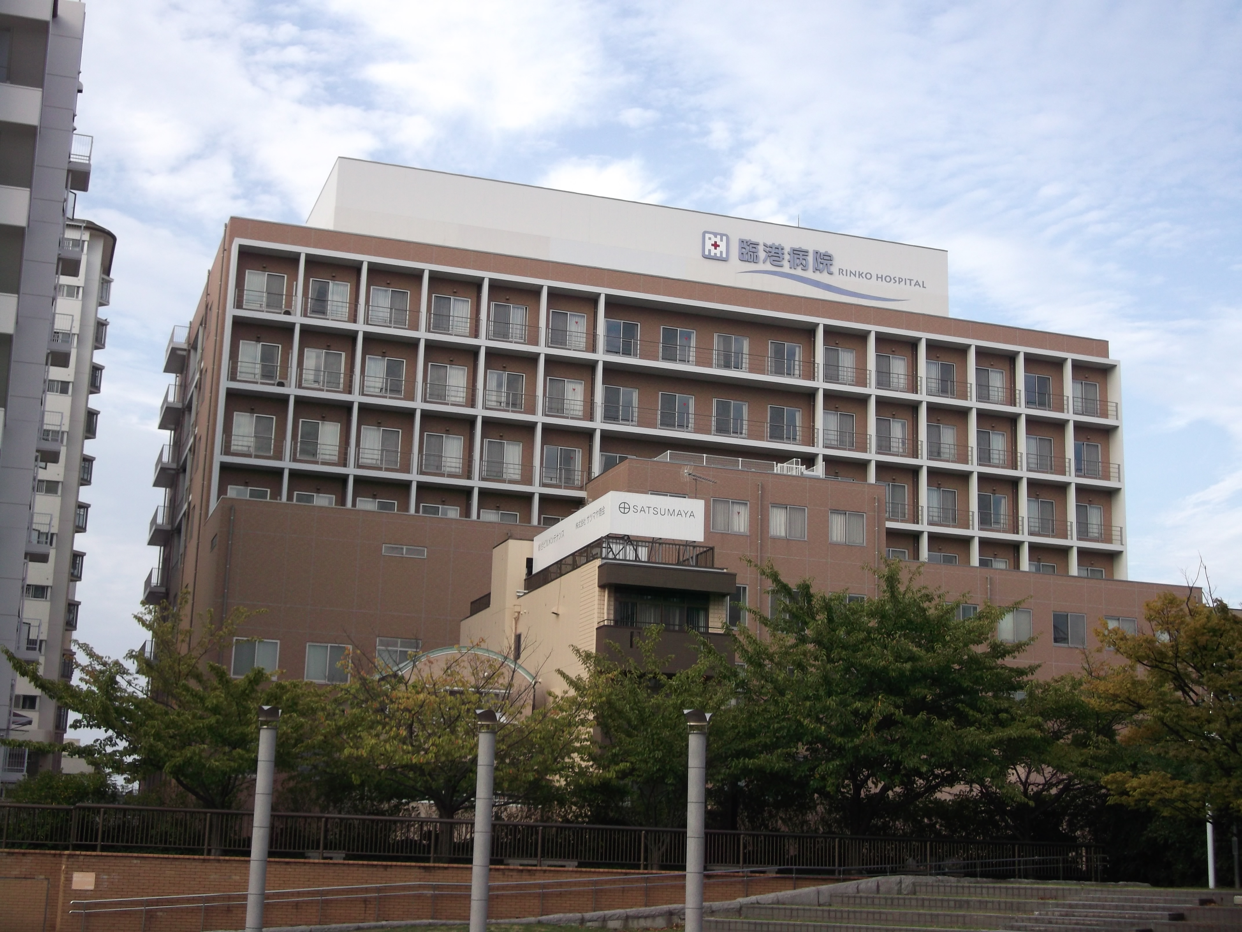 名古屋市港区名港二丁目の臨港病院を南側公道西側より撮影